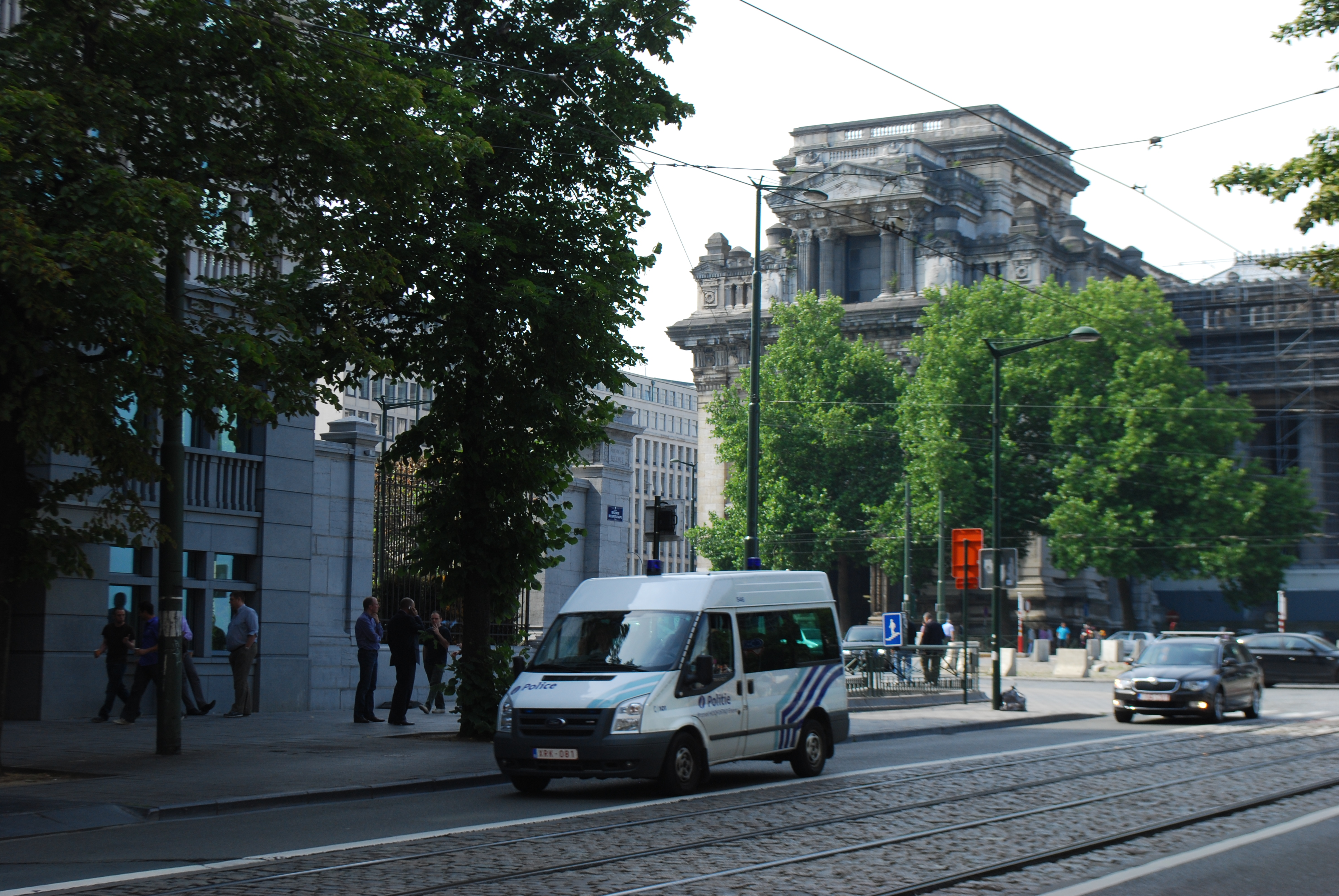 La place Poelaert à Bruxelles, vue depuis le rue de la Régence.